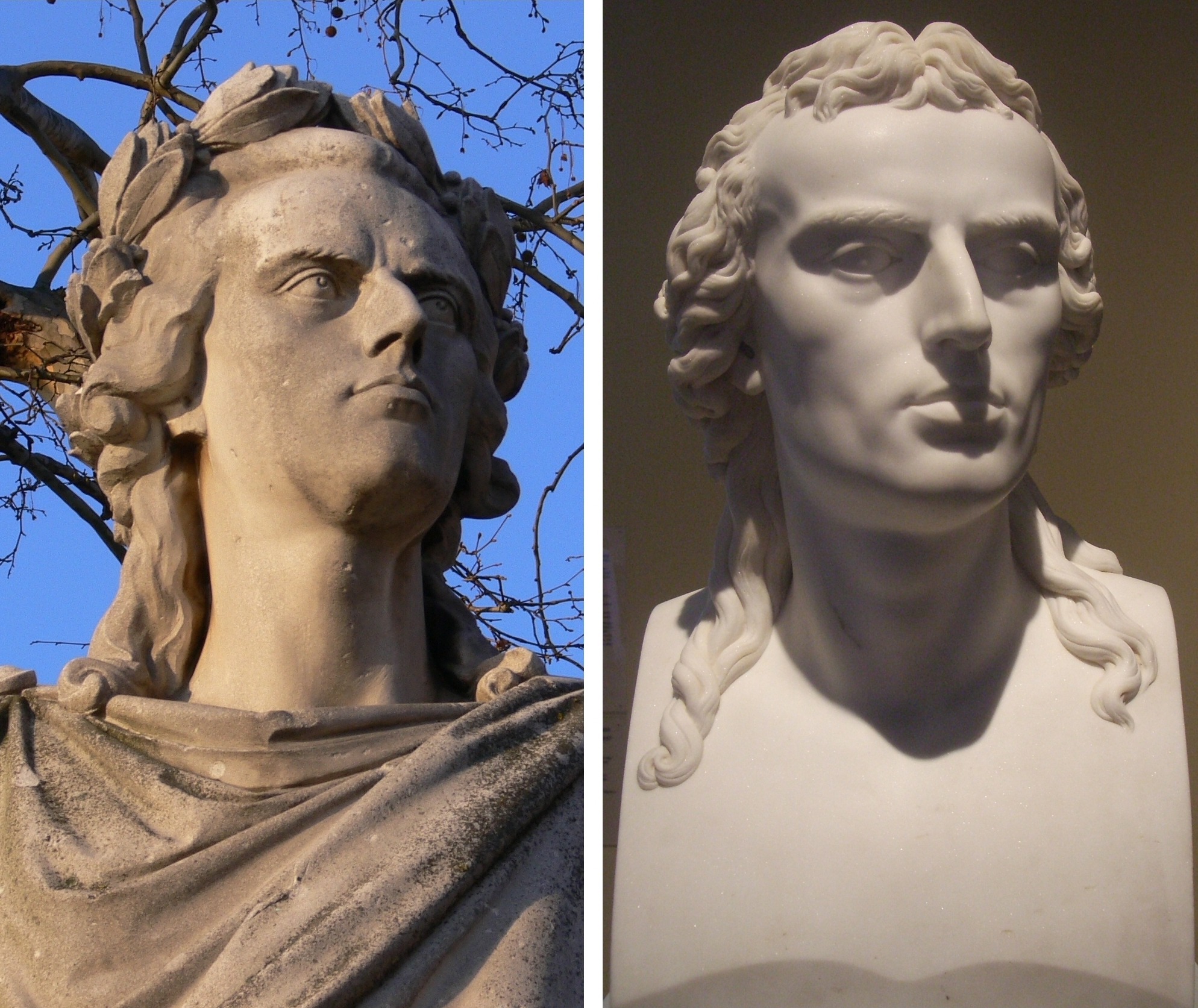 Links: Schillerkopf von Adolf von Donndorfs Schillerdenlmal in Stuttgart. Rechts: Johann Heinrich Danneckers Schillerbüste, Replikat seines Schülers Theodor Wagner.